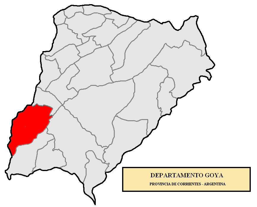 Localización del Departamento Goya en la provincia de Corrientes, Argentina Localización del Departamento Goya, en la provincia de Corrientes, Argentina.